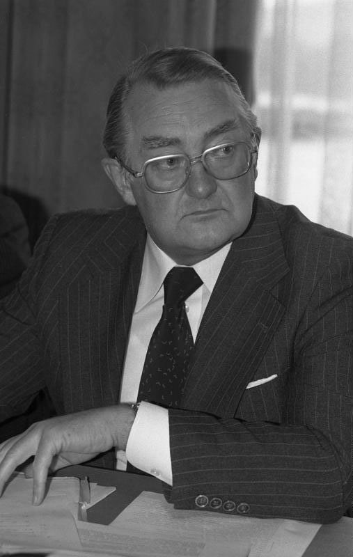 XXII Ordentlicher Kongreß der Europa-Union Deutschland im Rheinhotel Deesen, Bad Godesberg (Minister des Bundes Heinrich Aigner)